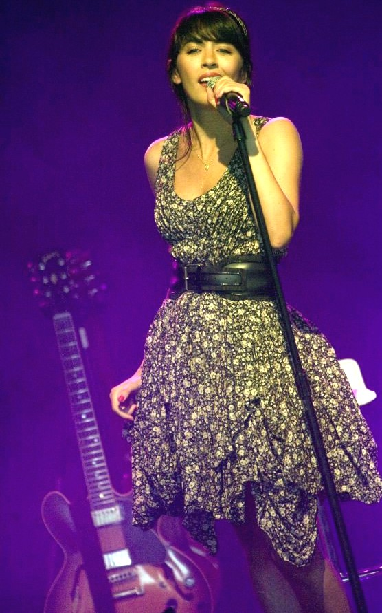 Nolwenn Leroy aux francopholies de Spa (Belgique) en 2010